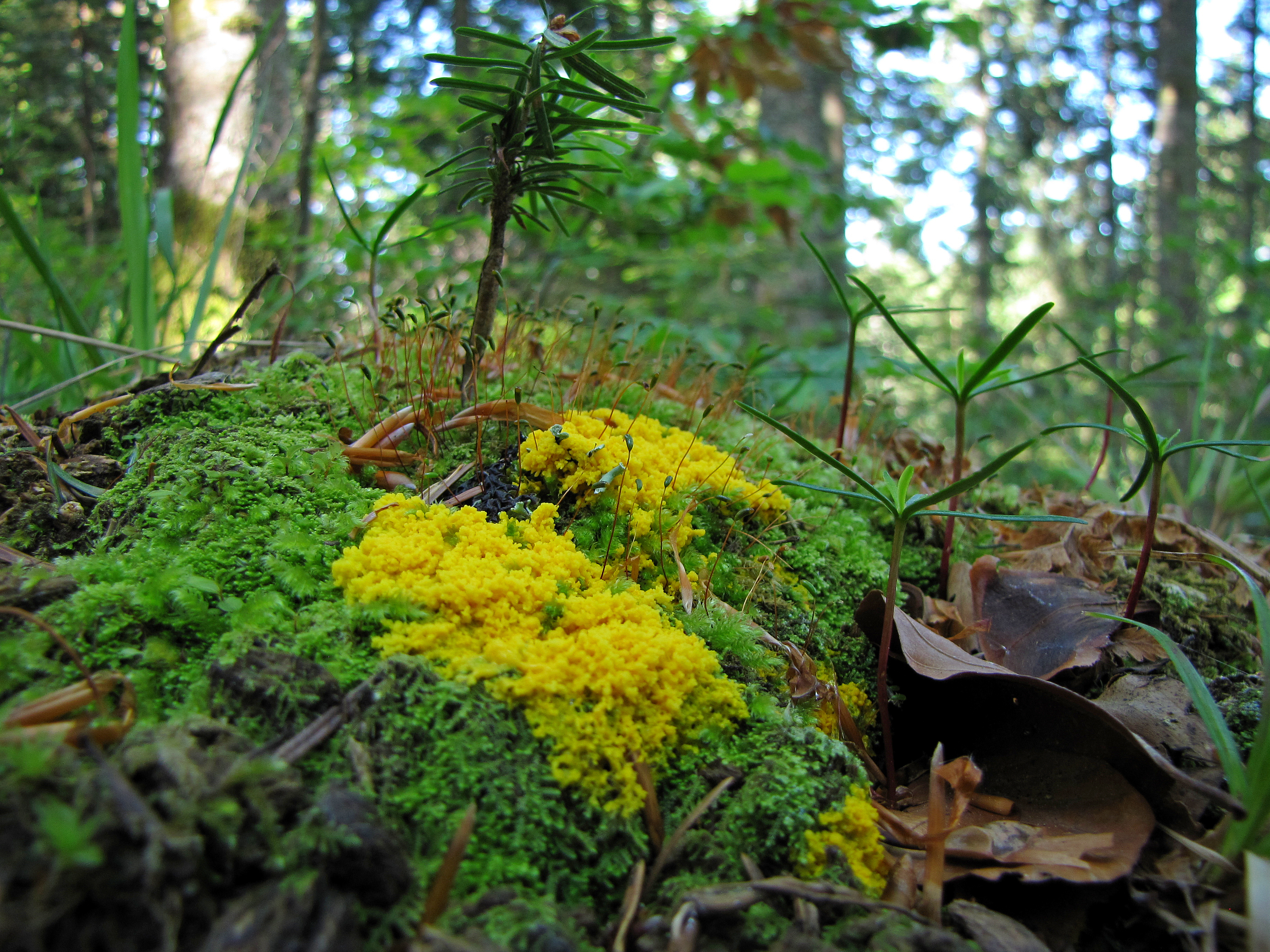 Srpski (latinica): Plazmodijum od bele do žuto-sive boje, obično 2,5-20 cm u prečniku i 1-3 cm debljine. Plazmodijum nakon nekog vremena formira etalijum nalik na sunđer, koji tamni i oslobađa tamne spore. Formira najveći etalijum od svih sluzavih gljiva, a spore raznose tvrdokrilci (familija Lathridiidae). Spore imaju zid od dva sloja, spoljašnji je gust i bodljikav, a unutrašnji je fibrozan. Prilikom klijanja, spoljašnji sloj se deli i stvara otvor, a elastičniji unutrašnji sloj puca dok protoplazma izlazi van zida spore. Raste na trulom drvetu i biljnom otpadu, ali može takođe da živi na stabljikama i listovima živih biljaka. Autor: Tihomir Simin